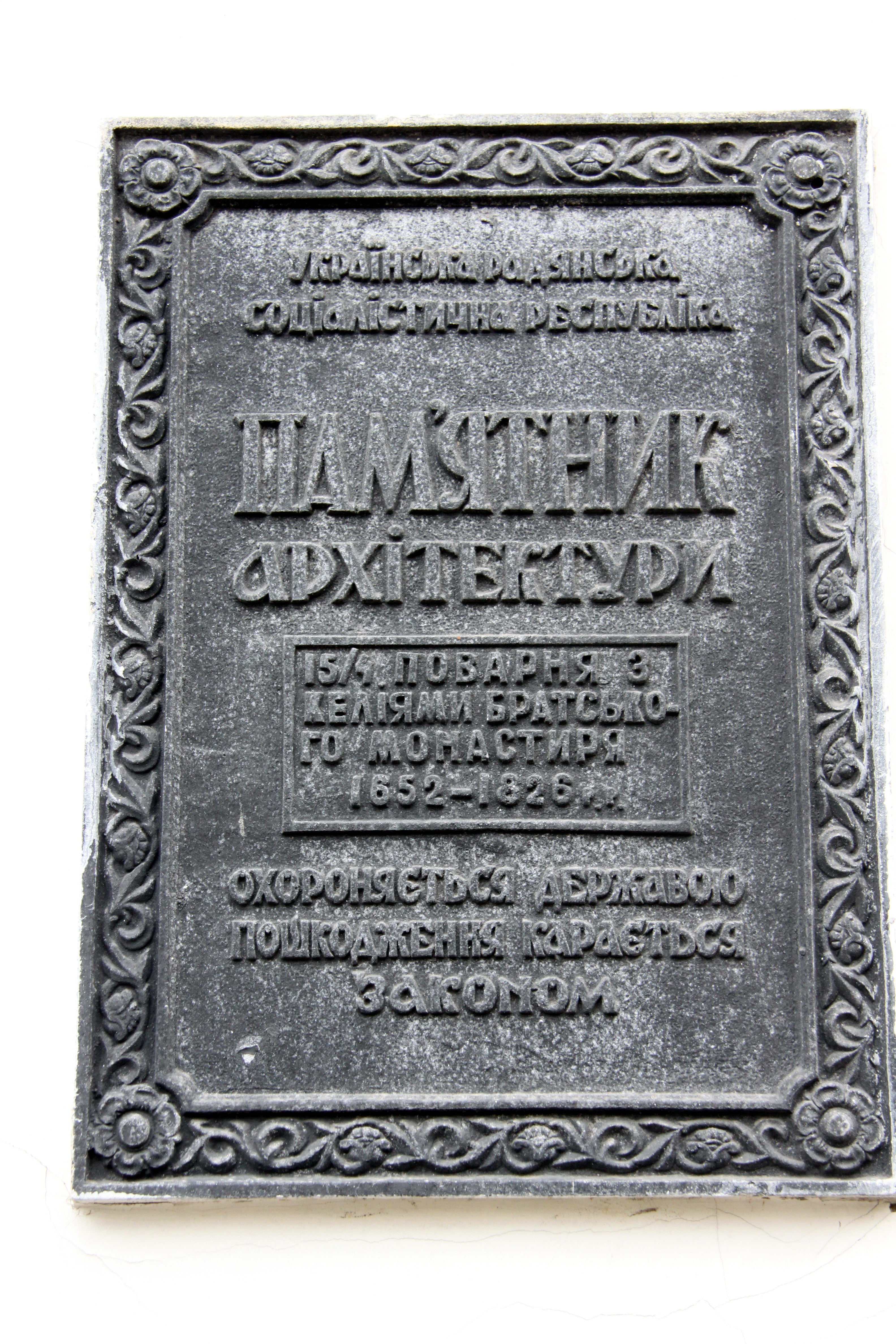 Поварня з келіями, Київ, Сковороди Григорія вул., 2-а